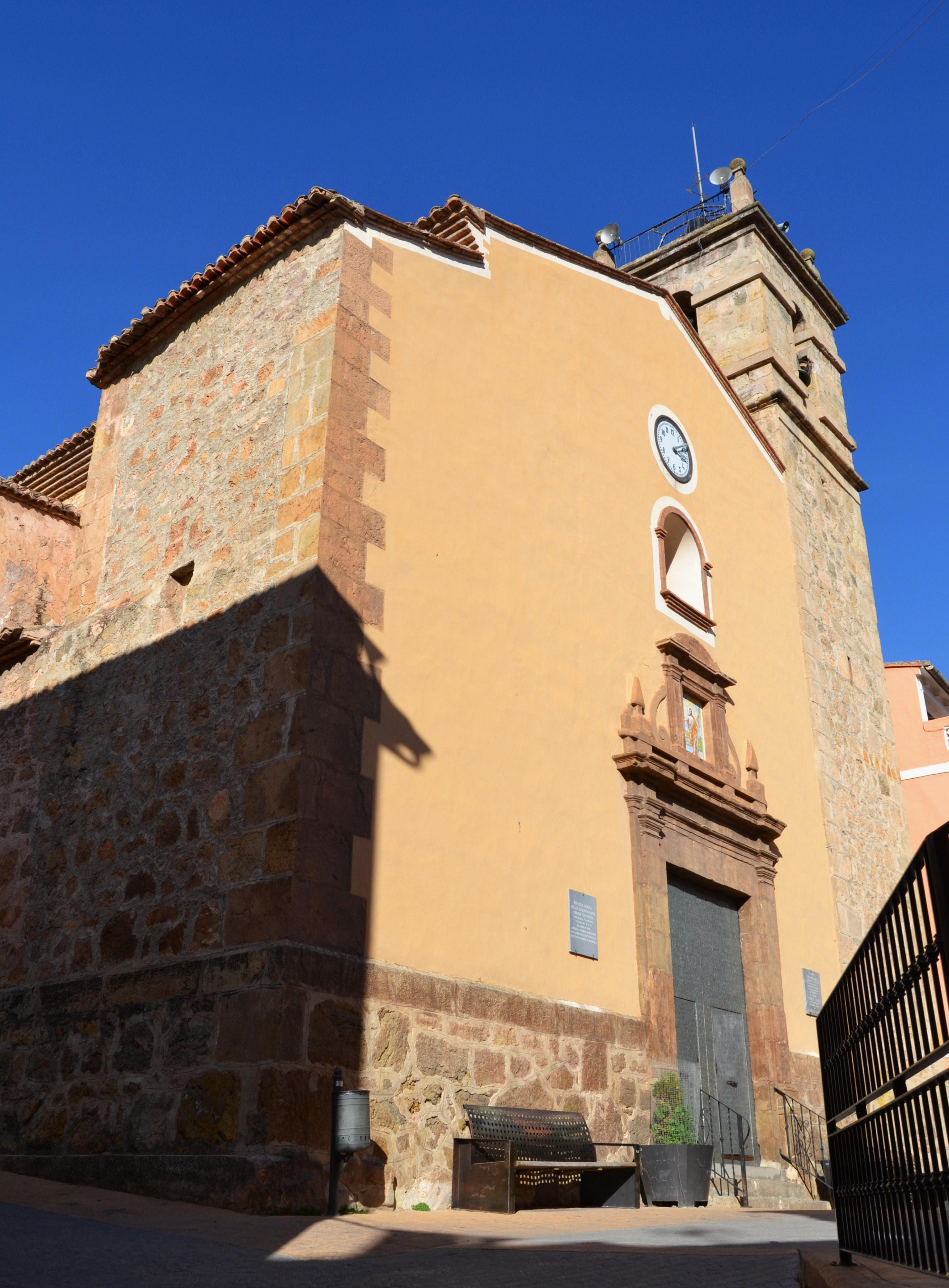 Església de sant Joan Baptista, Algímia d'Almonesir.